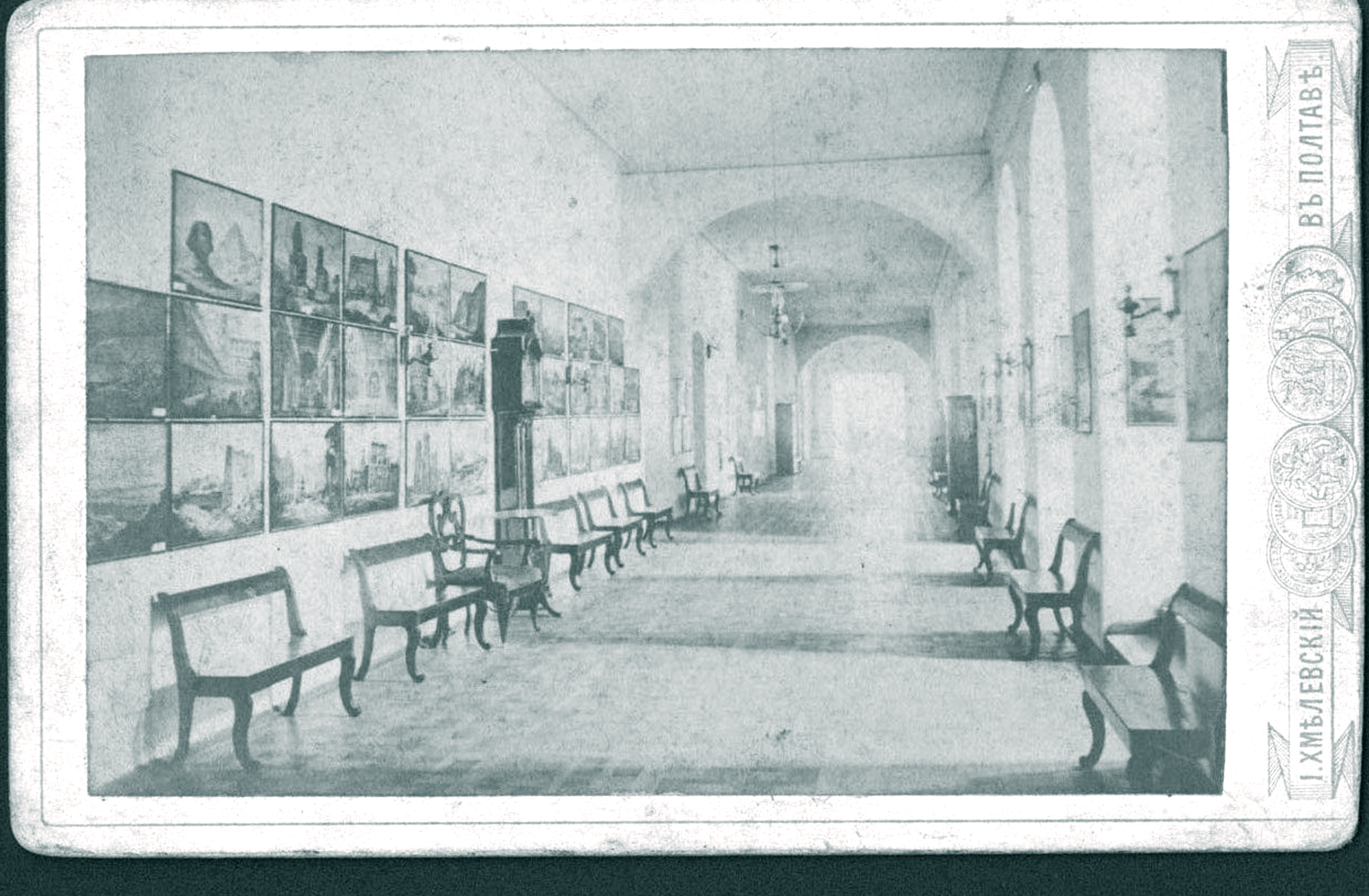 Полтава._Інститут_шляхетних_дівчат._Коридор_2-го_поверху_головного_корпусу.jpg: Полтава. Інститут шляхетних дівчат. Коридор 2-го поверху головного корпусу Poltava. Institute for Noble Maidens. The corridor of the 2nd floor of the main building Poltava. Institut pour jeunes filles nobles. Le couloir du 2ème étage du bâtiment principal